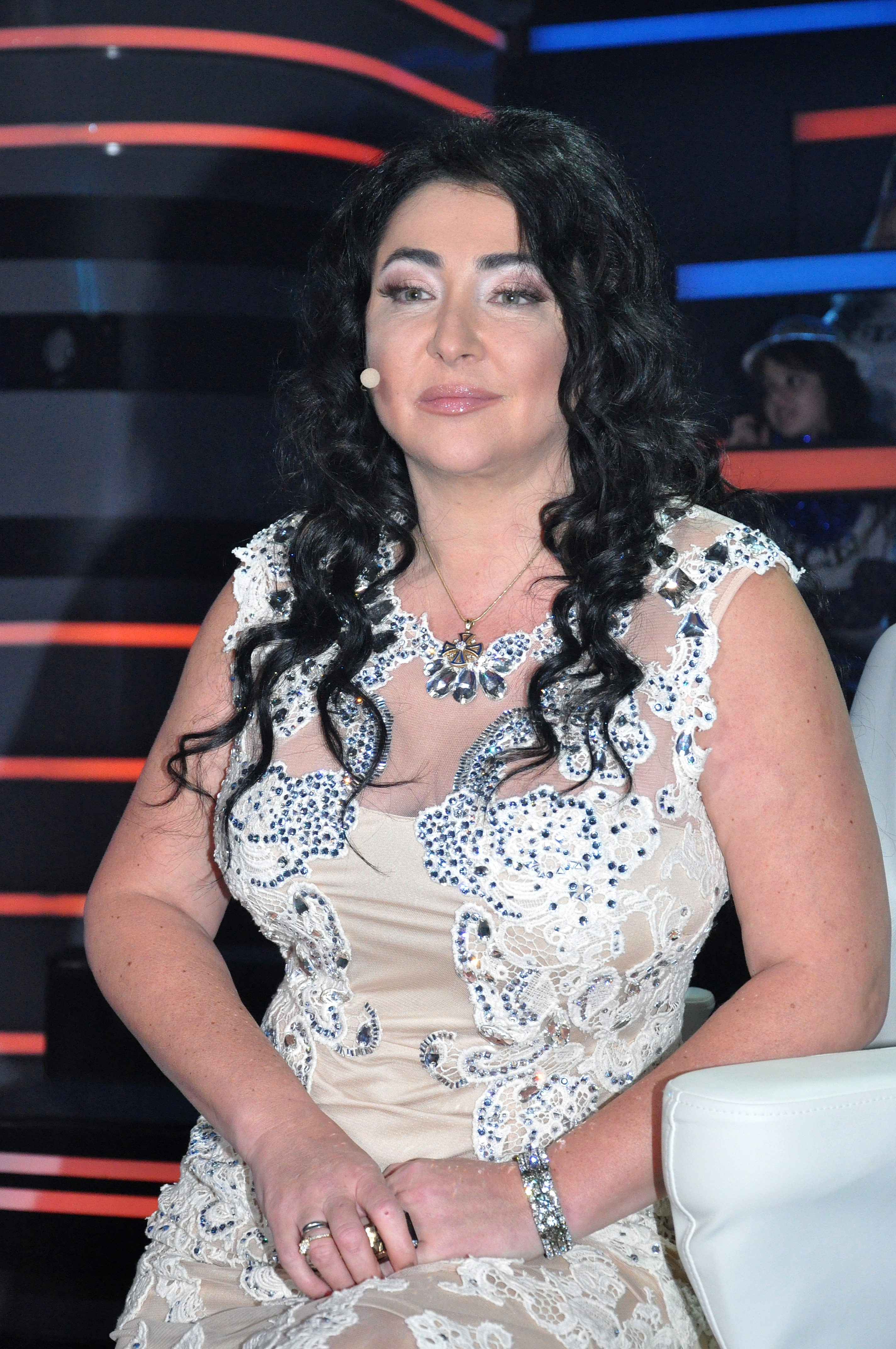 Лолита на съемках шоу "Машина времени"